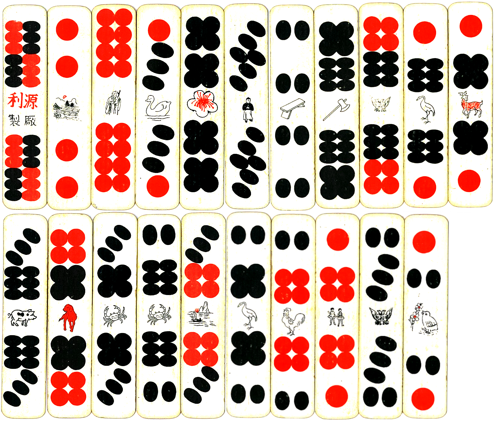 十五湖紙牌